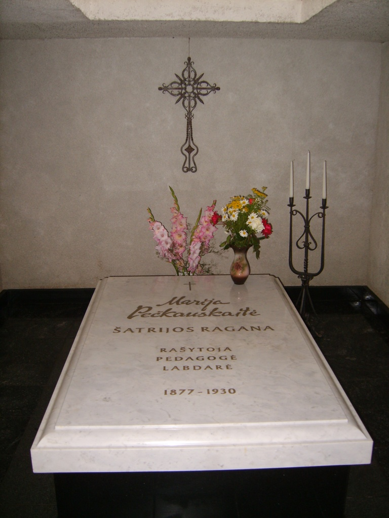 M. Pečkauskaitės kapas Židikų koplyčios rūsyje